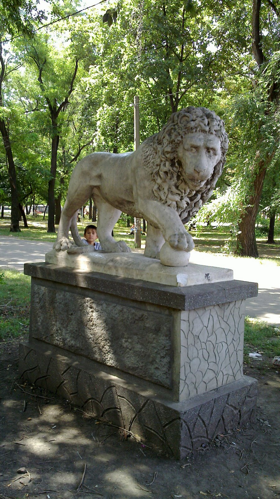 Center, Odessa, Odessa Oblast, Ukraine